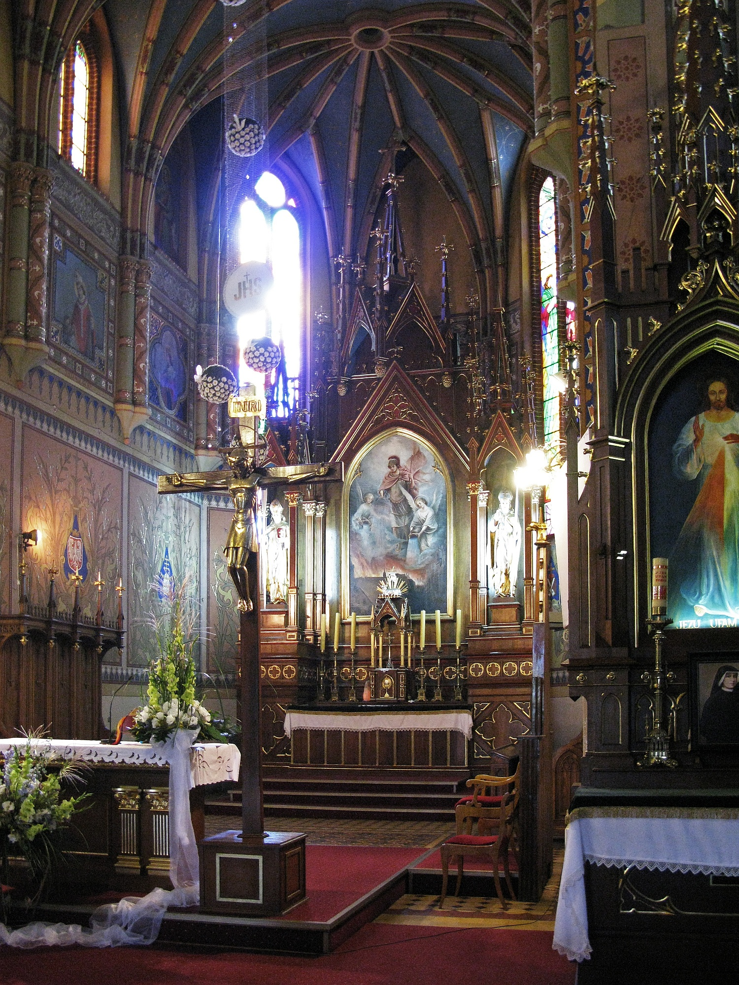 Ołtarz główny w kościele św. Floriana w Mogielnicy